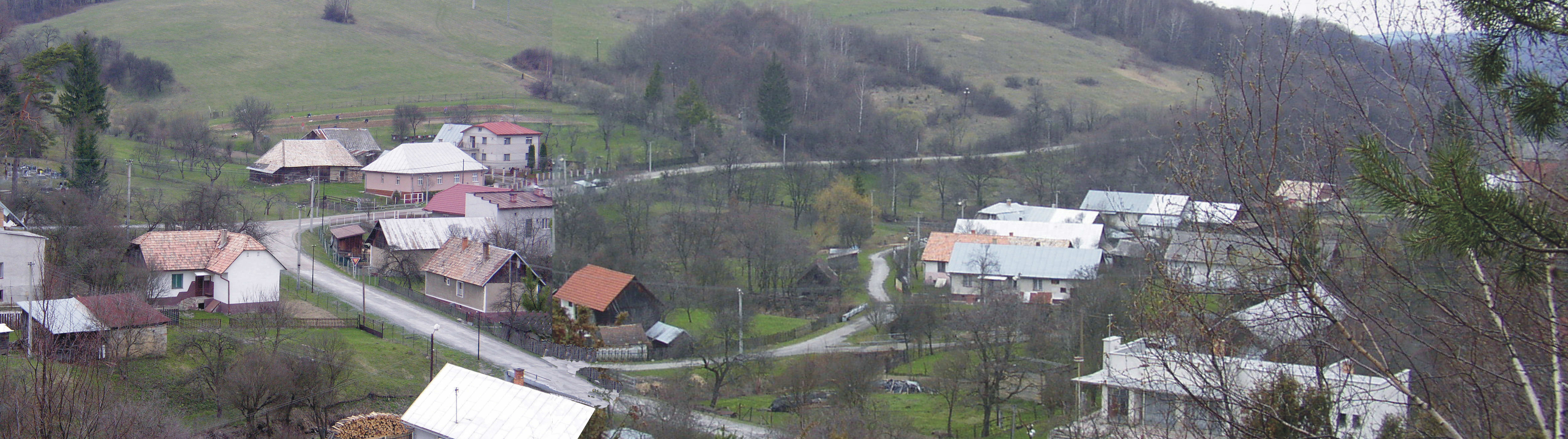 Panorama Bodruzal ZeliPV